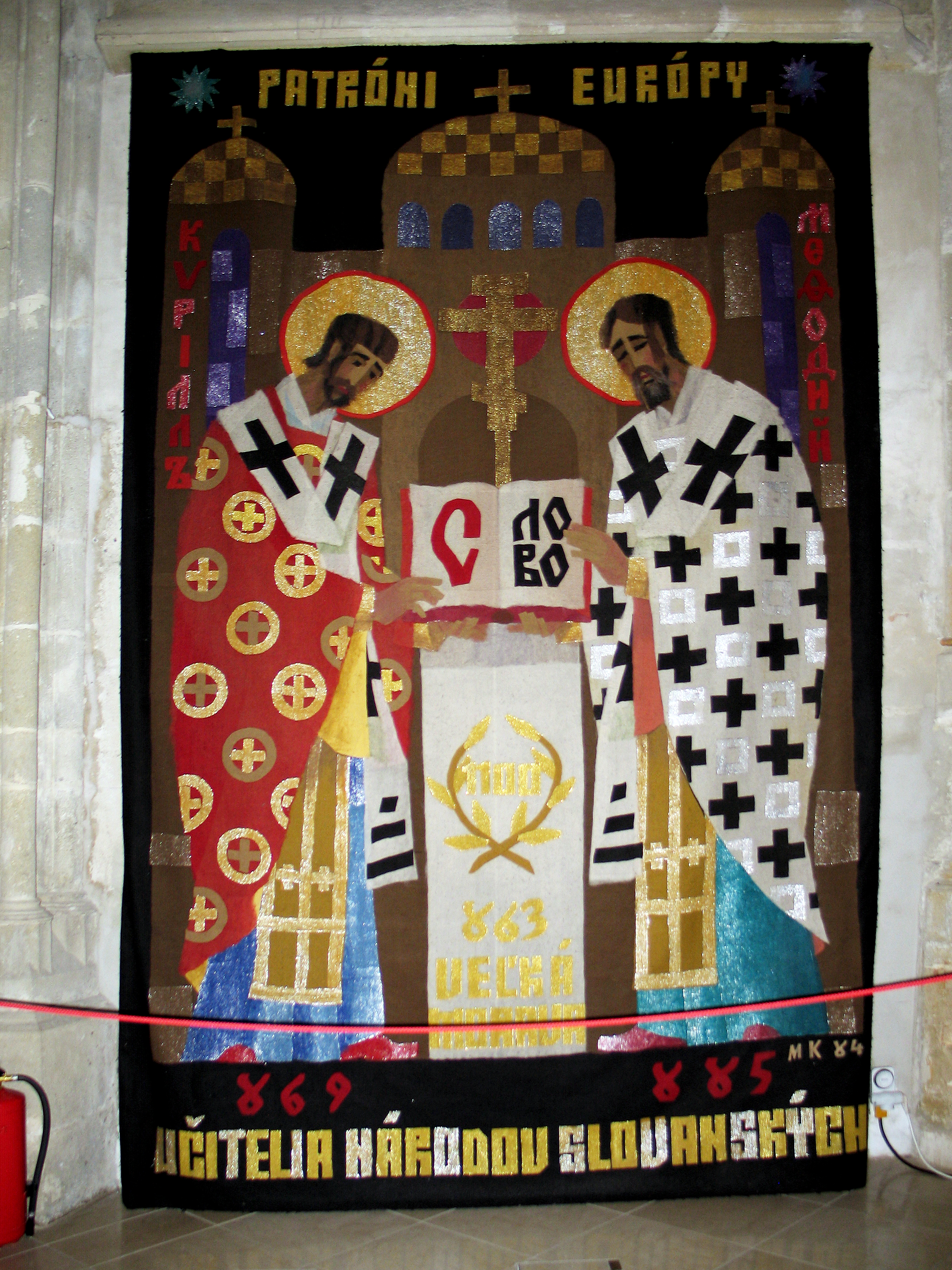 Sv. Konštantín zvaný Filozof (rehoľné meno Cyril) a sv. Metod. Filozof Konštantín vyvinul prvú slovanskú abecedu – hlaholiku, priniesol so sebou symbol byzantského dvojkríža, zvolil si tzv. staroslovenčinu (= starú cirkevnú slovančinu) priniesol so sebou preklady liturgických a biblických textov, ktoré už predtým pripravil s Metodom.